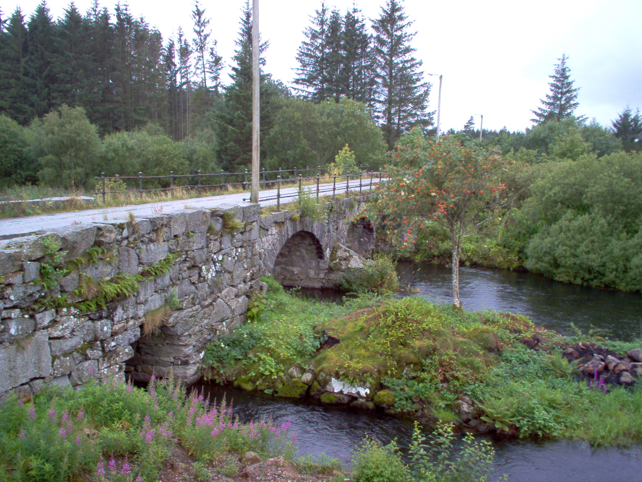 Skjæveland bru, stone bridge from 1852, crossing Figgjoelva (Figgjo river).